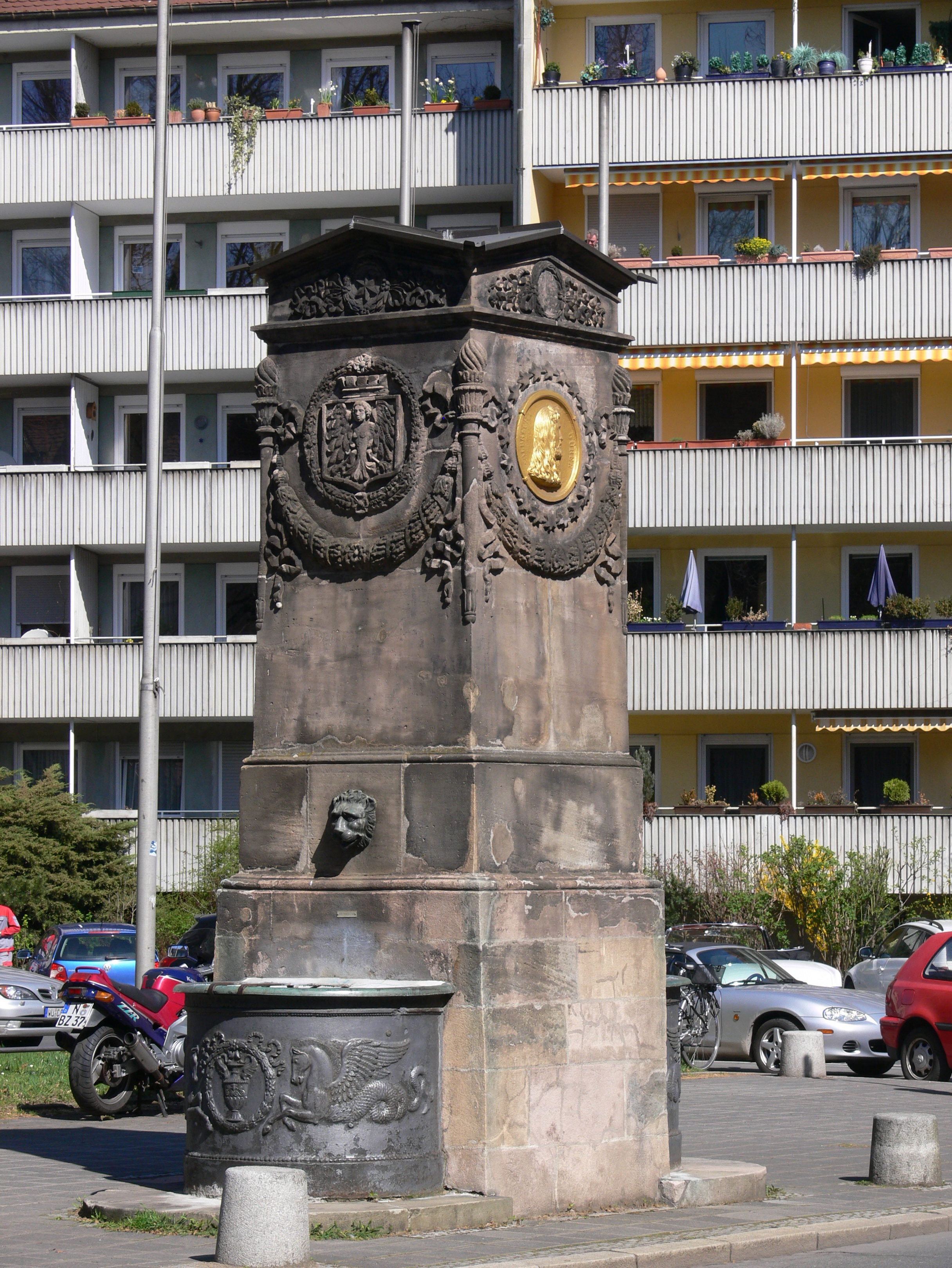 Nürnberg, Dürer-Pirckheimer-Brunnen („Freundschaftsbrunnen“) am Maxplatz